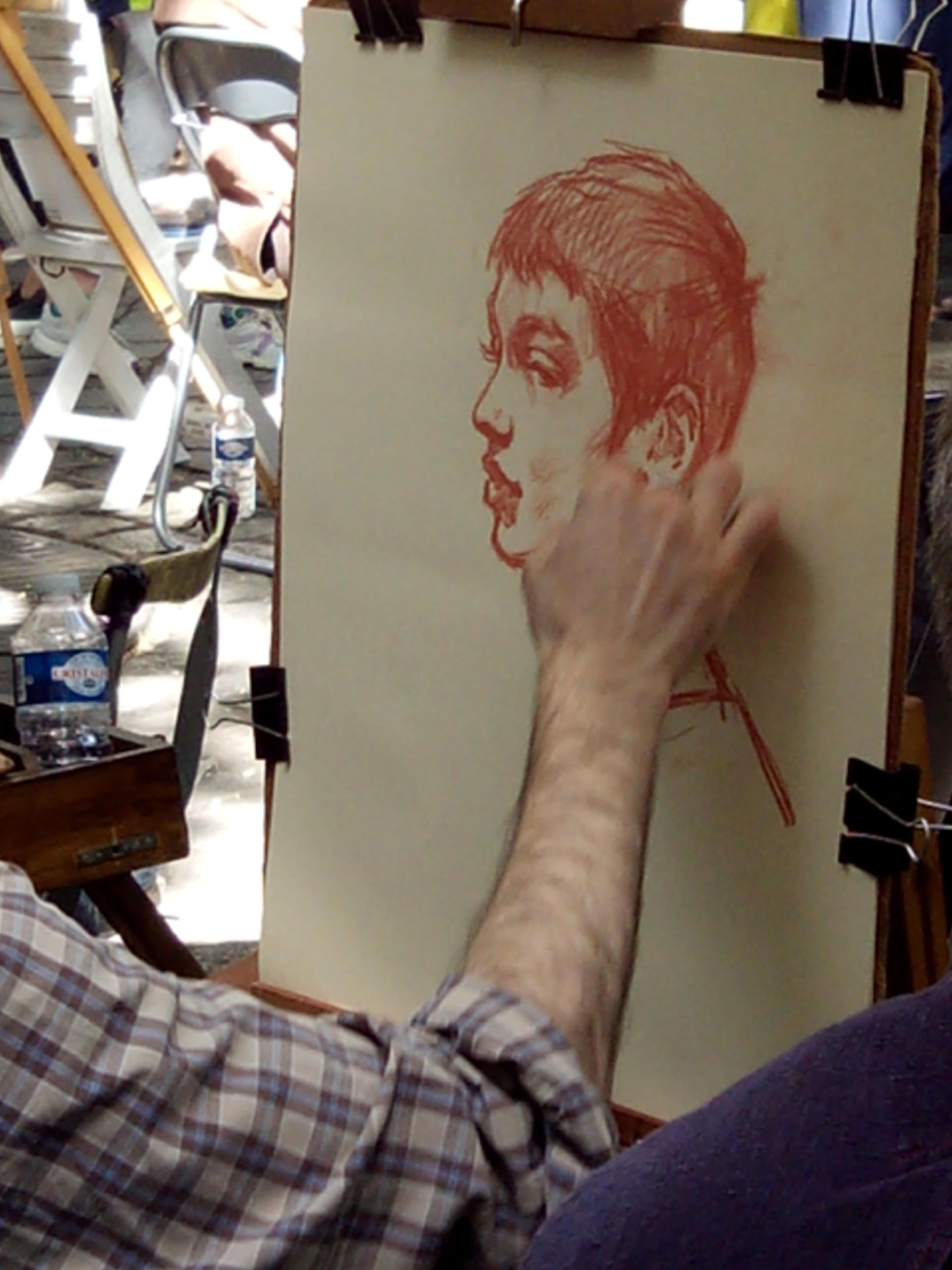 Retrato, Montmartre, París, agosto de 2014